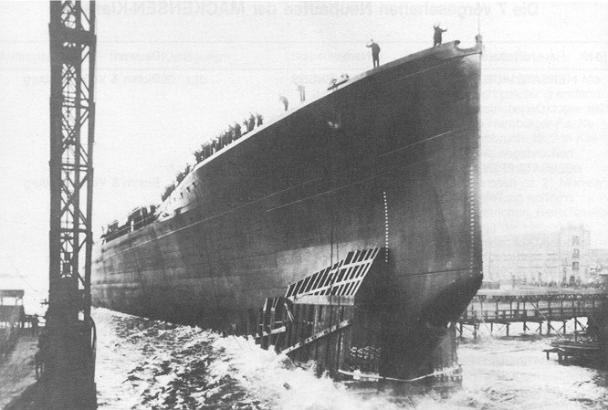 SMS Mackensen